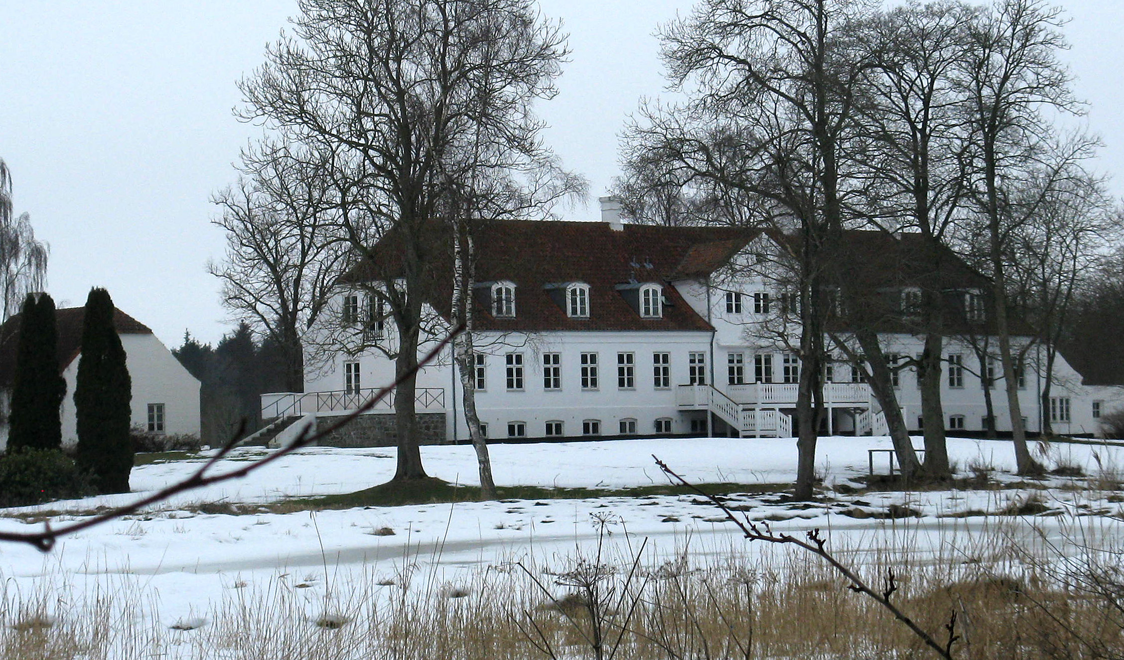 Østergård i Tulstrup Sogn i Århus Kommune. Gården set fra øst